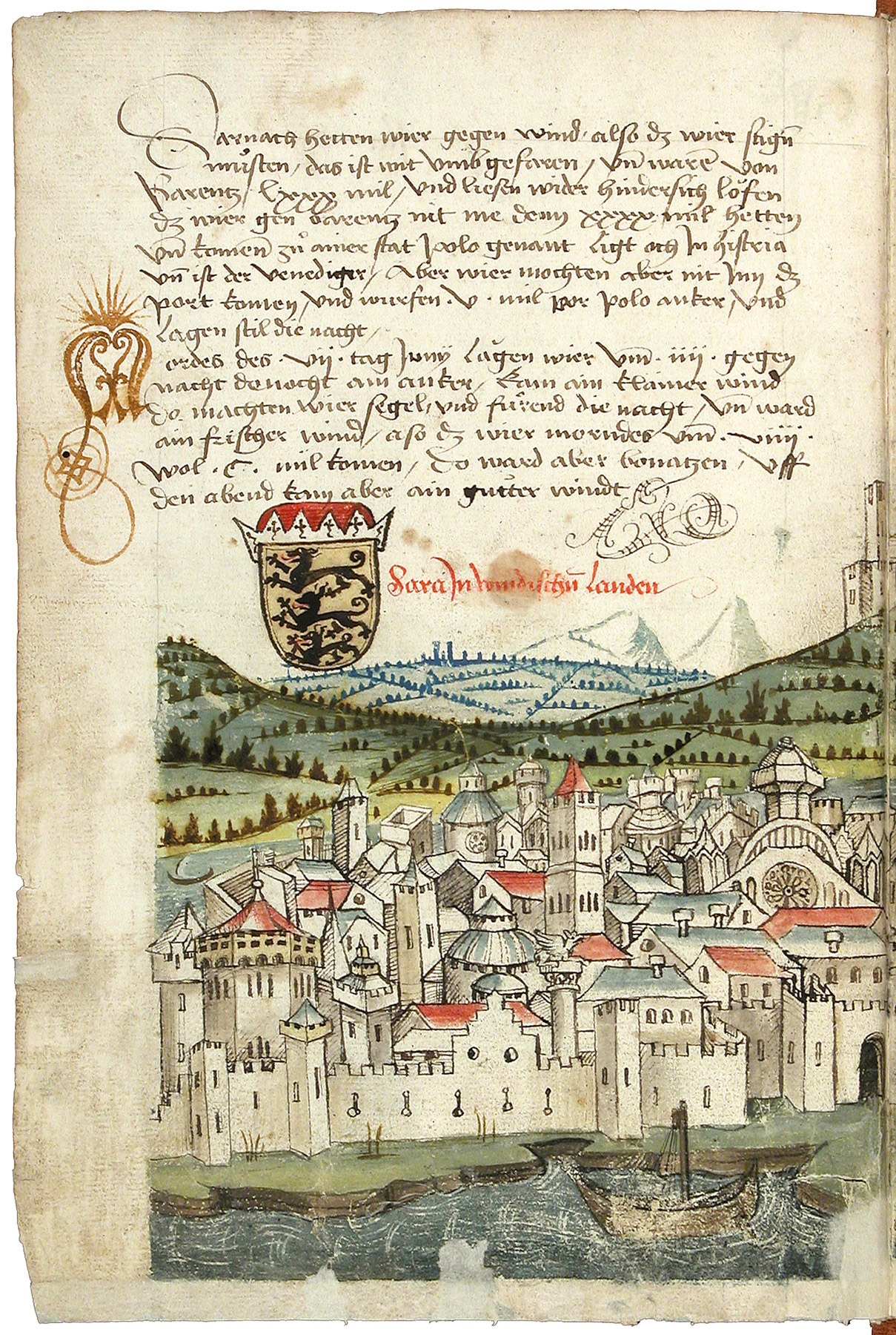 Zadar. Schilderung einer Pilgerreise von Konstanz nach Jerusalem durch Konrad von Grünenberg, um 1487 Konrad von Grünenberg: Beschreibung der Reise von Konstanz nach Jerusalem - Cod. St. Peter, pap. 32. Handschrift, Bodenseegebiet (Konstanz?), um 1487. II + 53 Blätter, 32x21, mit 31 kolorierten Zeichnungen der Reiseroute von Venedig bis Palästina. Text in alemannischer Mundart.